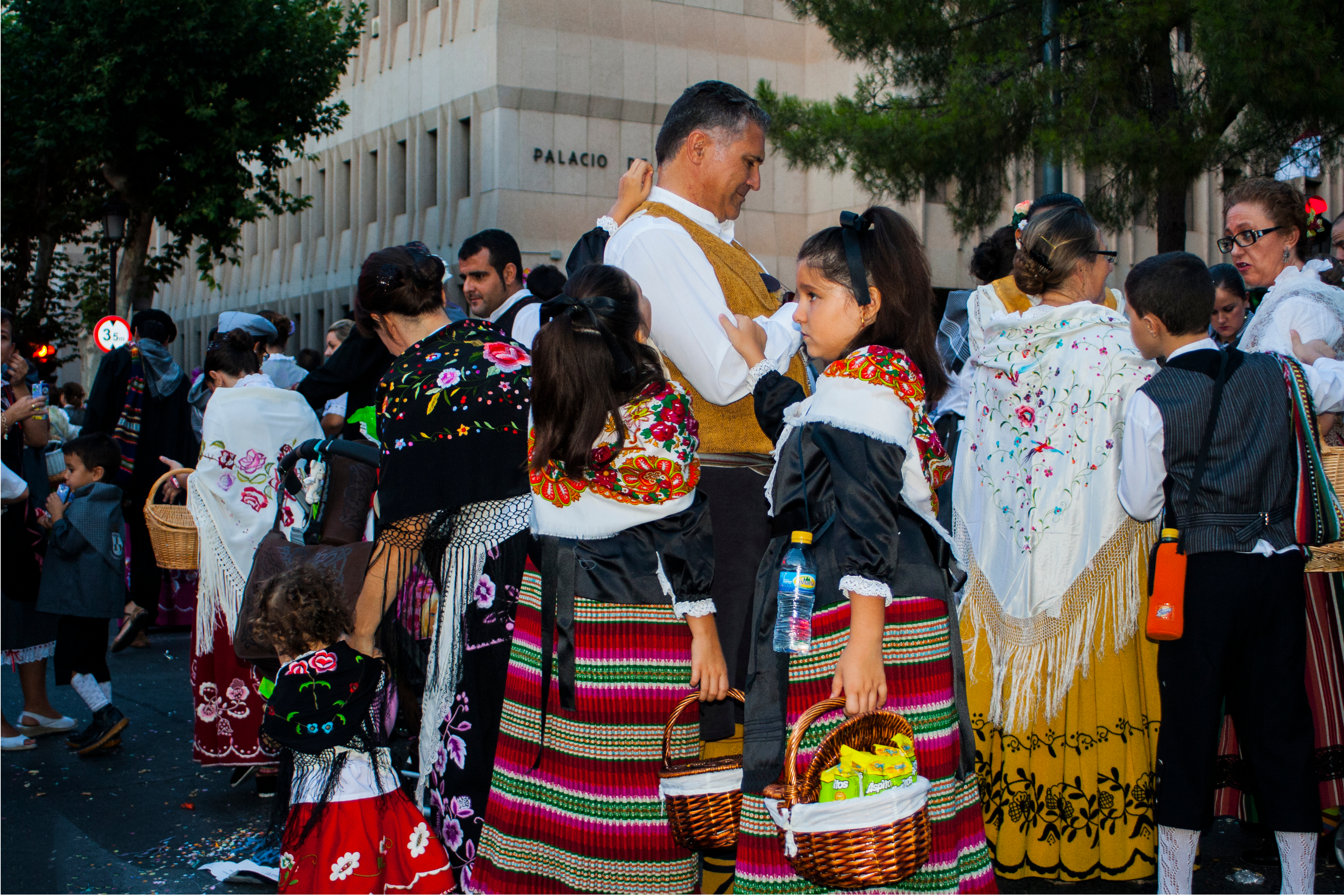 Manchegos de Albacete en su gran feria